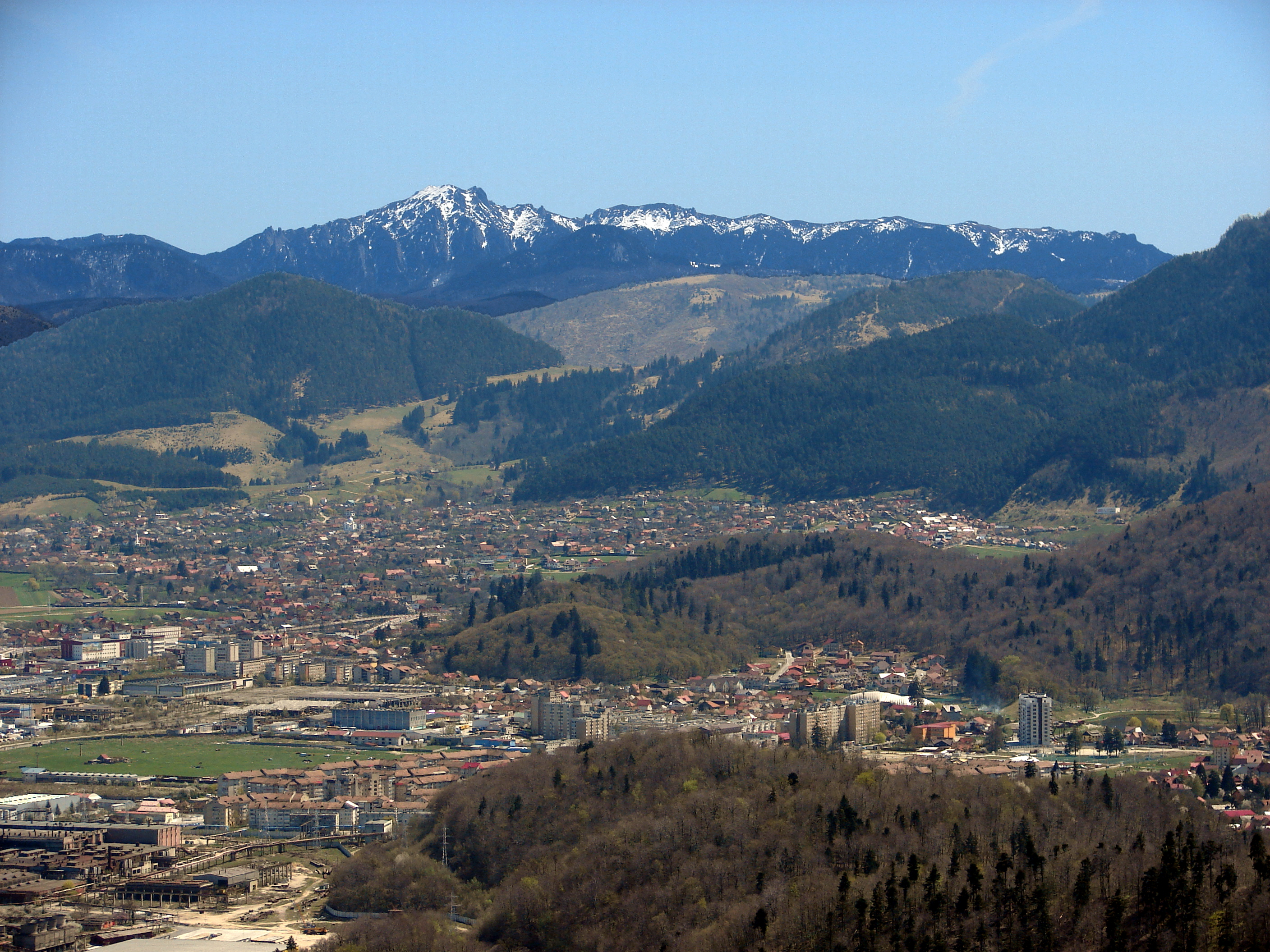 Cartierul Noua, Săcele, Munţii Ciucaș